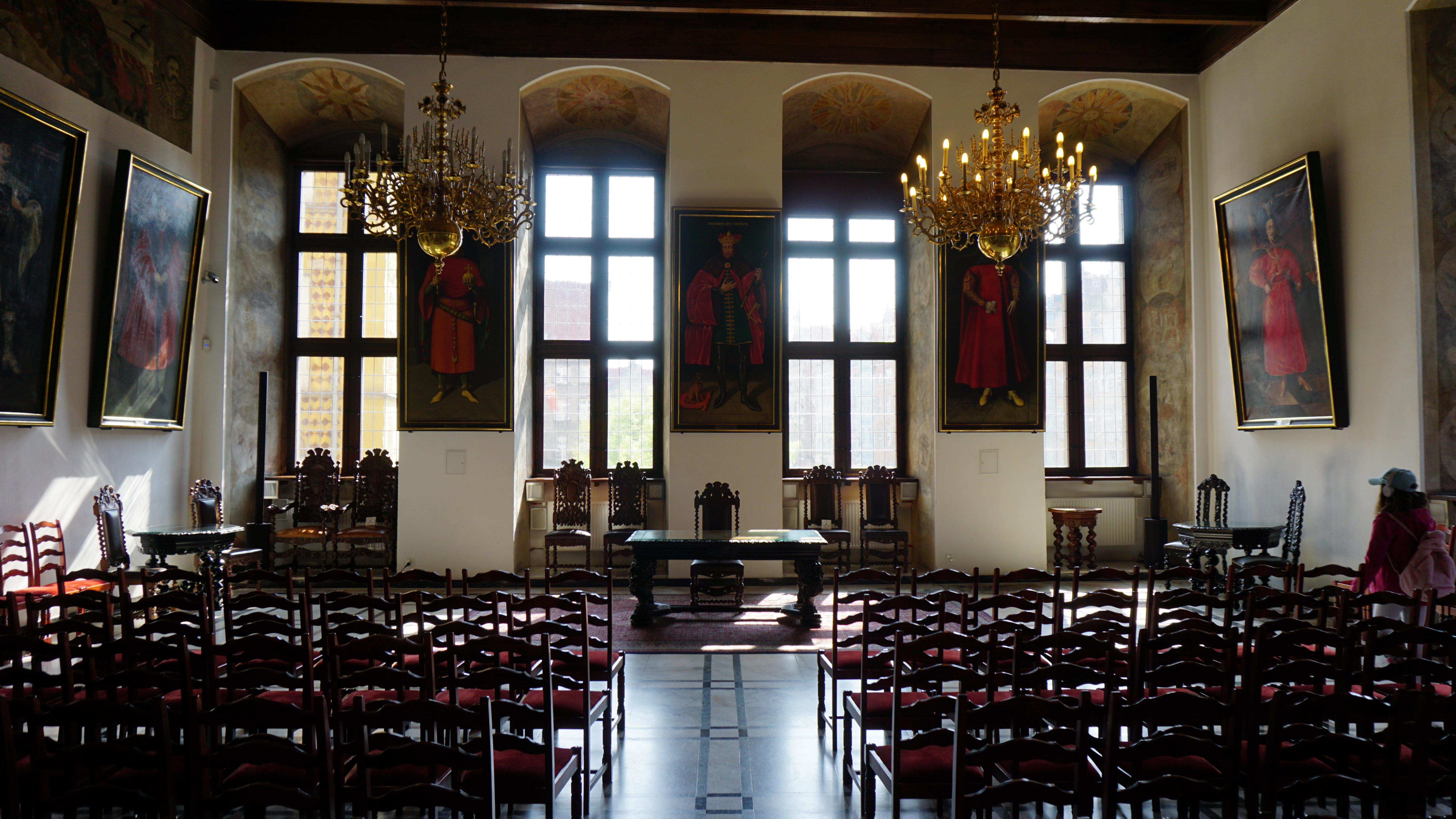 Gdansk 2018 spring -020